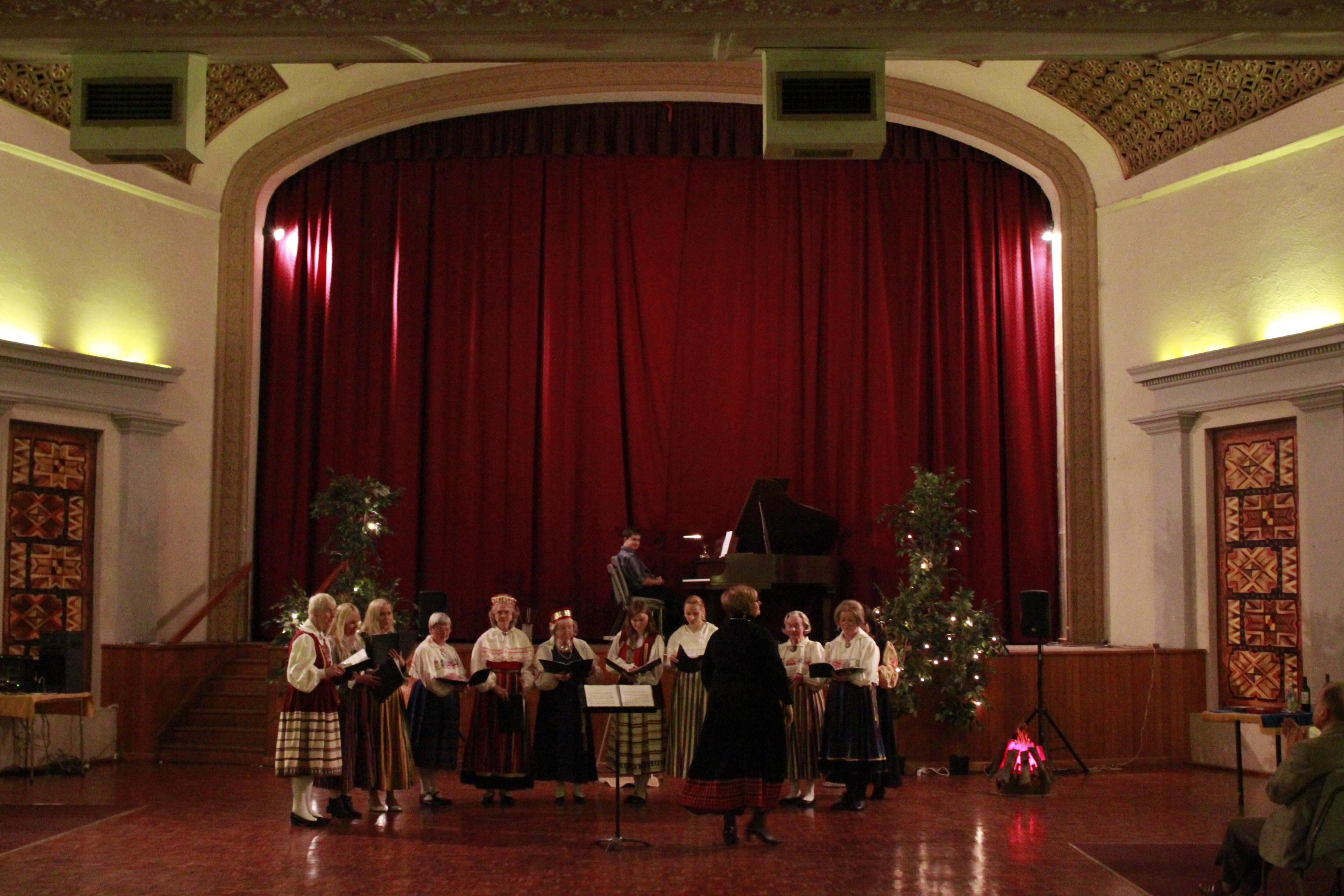 Melbourne'i Eesti Maja -- naiskoor andmas jaanipäevakontserti 2012. aastal.